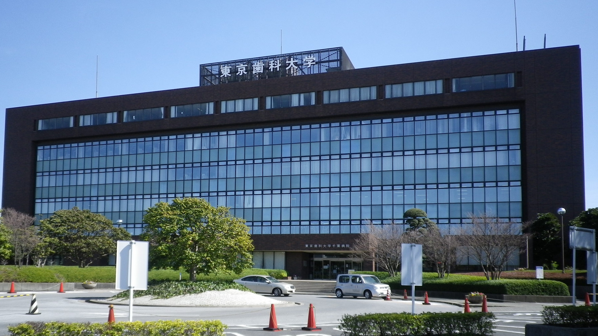 東京歯科大学（千葉キャンパス）の病院棟